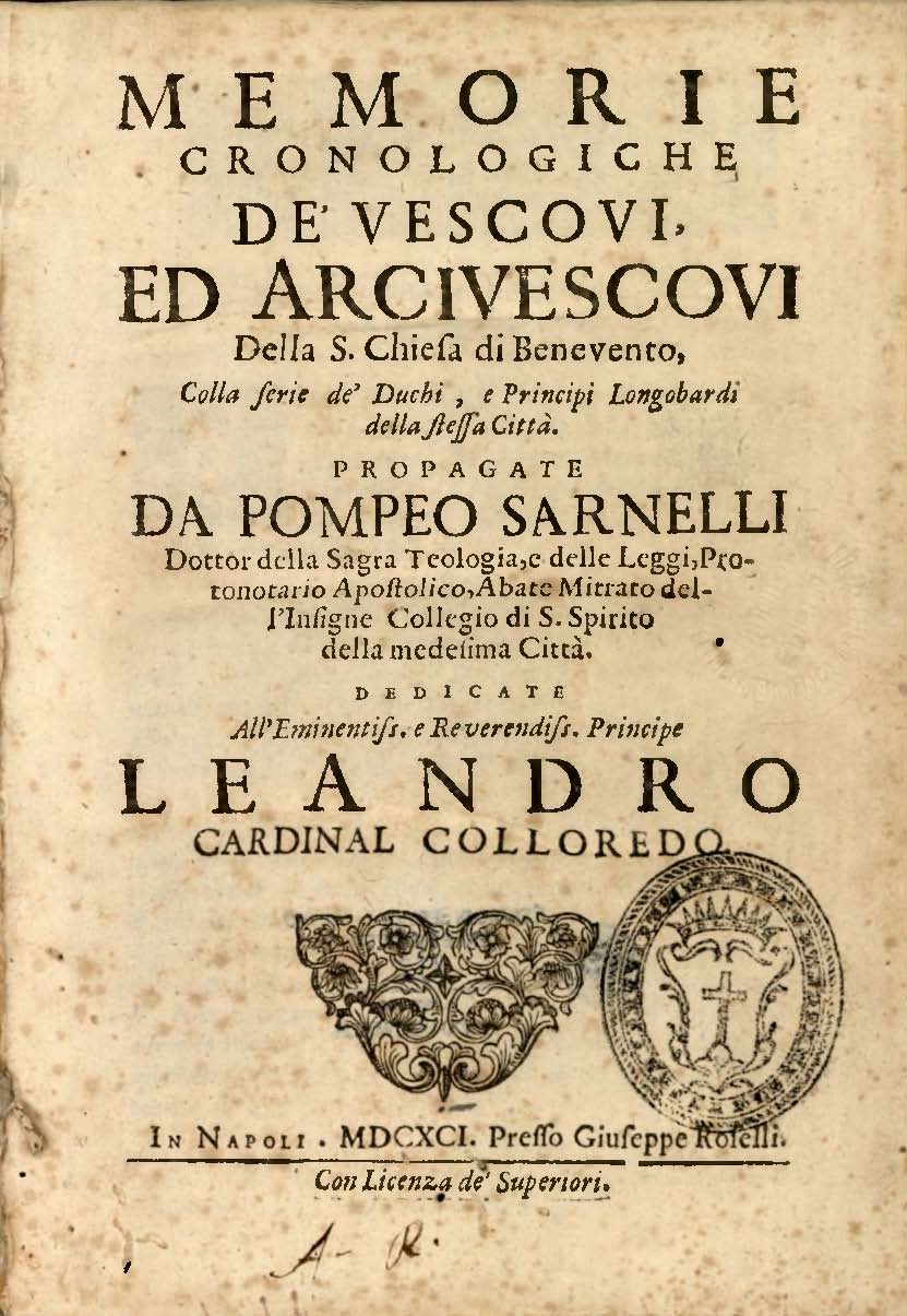 Memorie cronologiche de’ Vescovi ed Arcivescovi della S. Chiesa di Benevento colla serie de' Duchi e Principi Longobardi della stessa città. Propagate da Pompeo Sarnelli, Dottor della Sagra Teologia, e delle Leggi, Protonotario Apostolico, Abate Mitrato dell'Insigne Collegio di S. Spirito della medesima Città. Dedicate all'Eminentiss. e Reverendiss. Principe Leandro Cardinal Colloredo